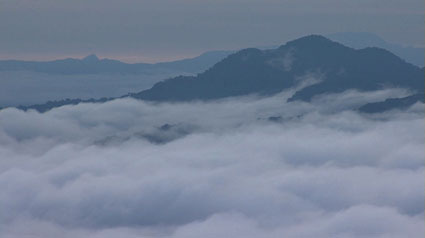 photo prise au Cameroun durant le tournage du documentaire "Les Brumes du Manengouba",forêts bakossi dans la brumes 2007.